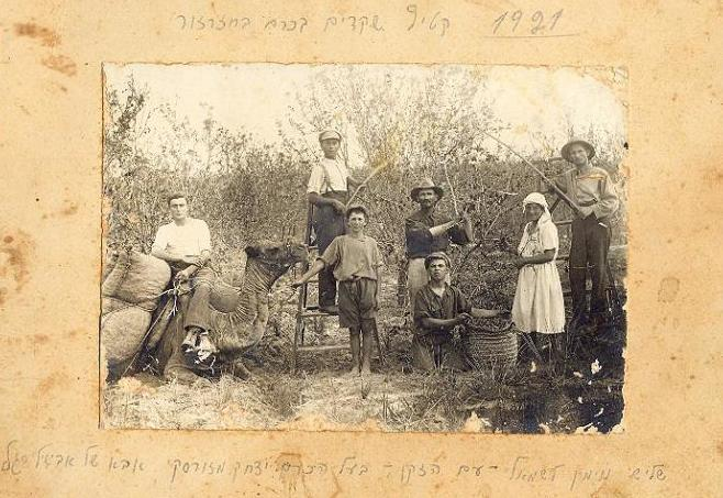 קטיף שקדים בכרם חזרזור (נוה עוז כיום). קוטפת ושישה קוטפים, אחד יושב על הגמל. השקדים הקטופים בשק.השלישי מימין עם זקן- בעל הכרם יצחק מזורסקי, אביה של אביגיל סגל